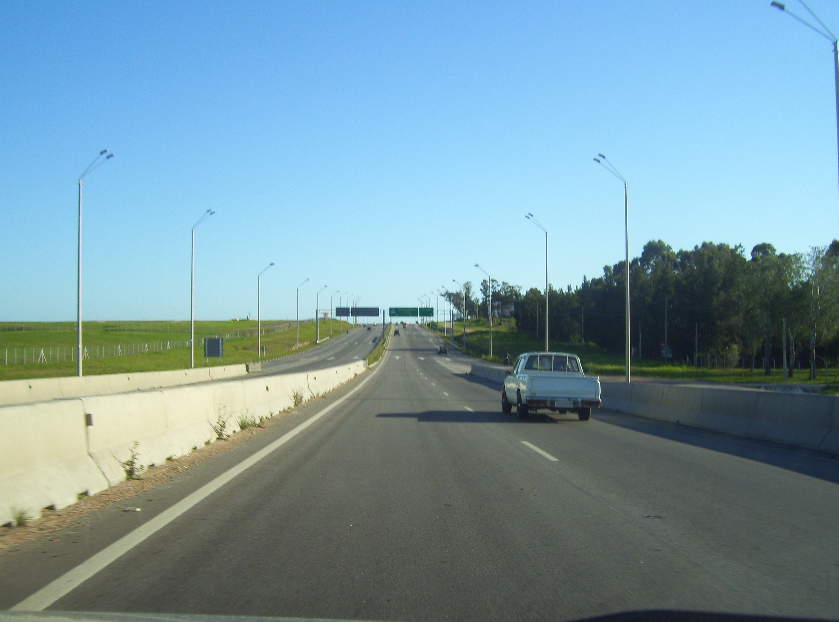 Ruta 101 próximo a su cruce con la Ruta Interbalnearia-Canelones-Uruguay